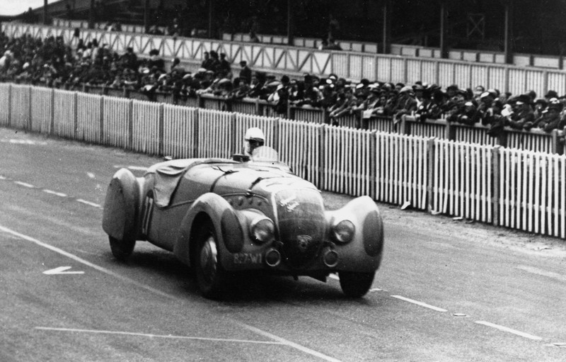 Peugeot 402 Darl'Mat Le Mans carrossée par Pourtout